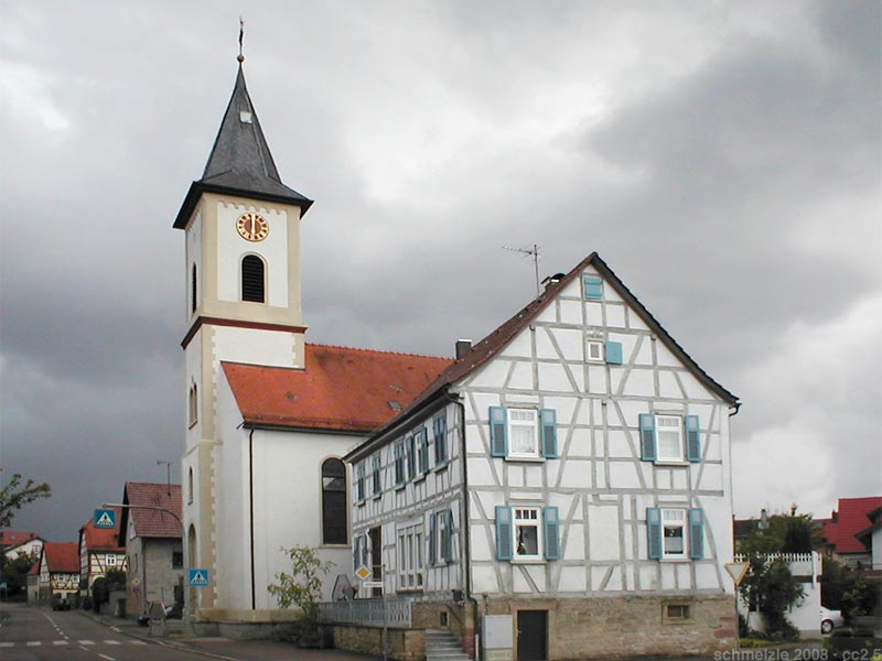 Kath. Kirche in Siegelsbach, davor die ehem. katholische Schule